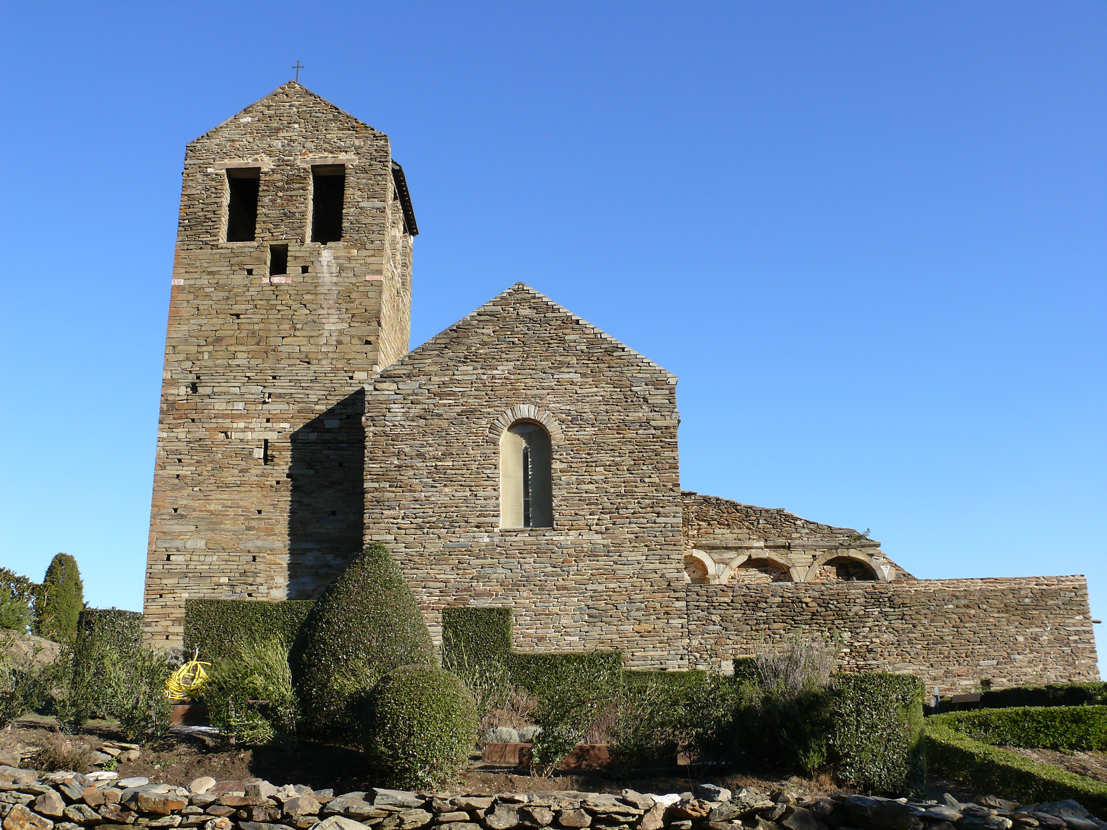 Vue de façade du prieuré de Serrabone, Boule d'Amont (66)